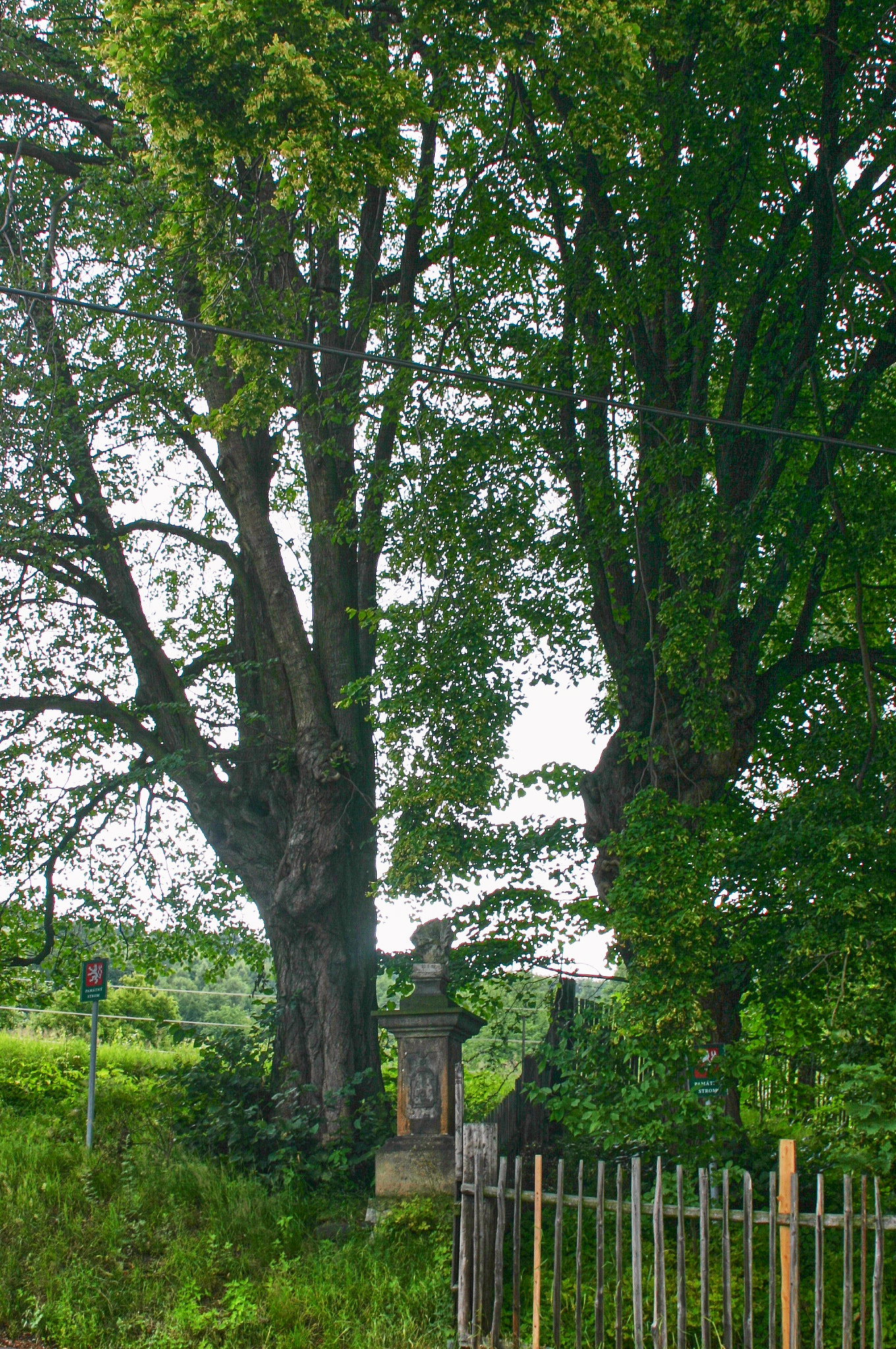 Chráněné lípy v Horní Vsi u Litvínova